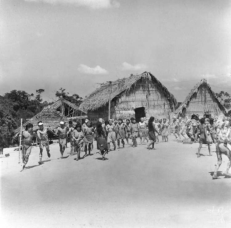 Dança do povo Tiriyó